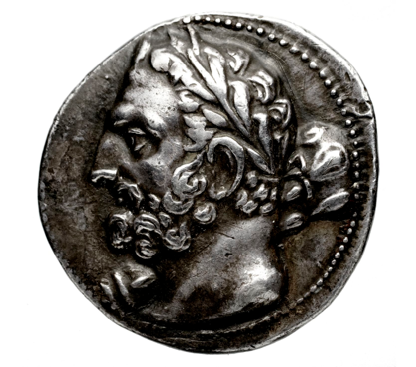 Ancien possesseur : Luynes, Honoré d'Albert (1802-1867 ; duc de). Ancien possesseur